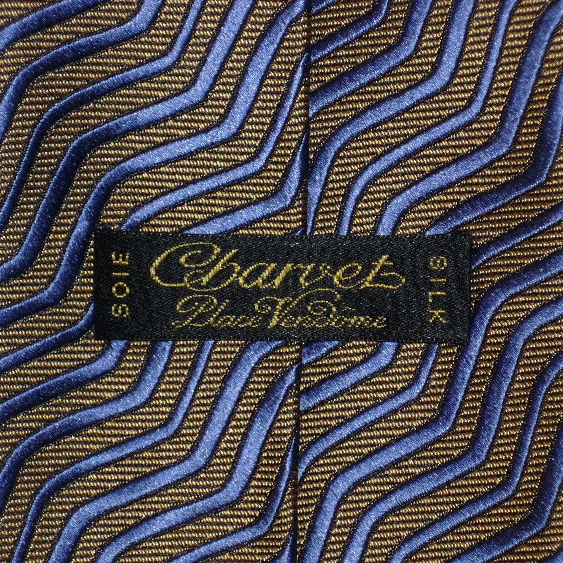 Charvet Paris Griffe passe-pan cravate motif rayures